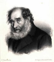 Christian Hviid Bredahl (1784-1860) var en dansk skald.